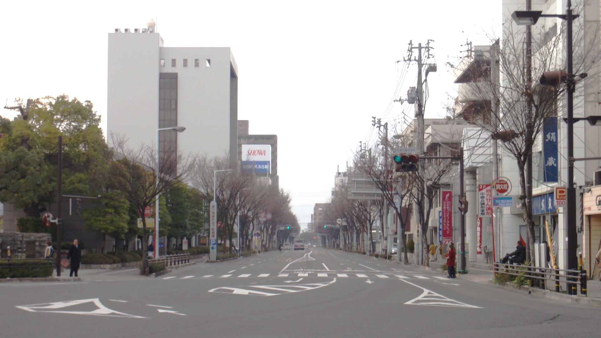 香川県高松市番町にある番町一丁目交差点から西を見る。この交差点は県道173号と市道五番町西宝線が交差している。